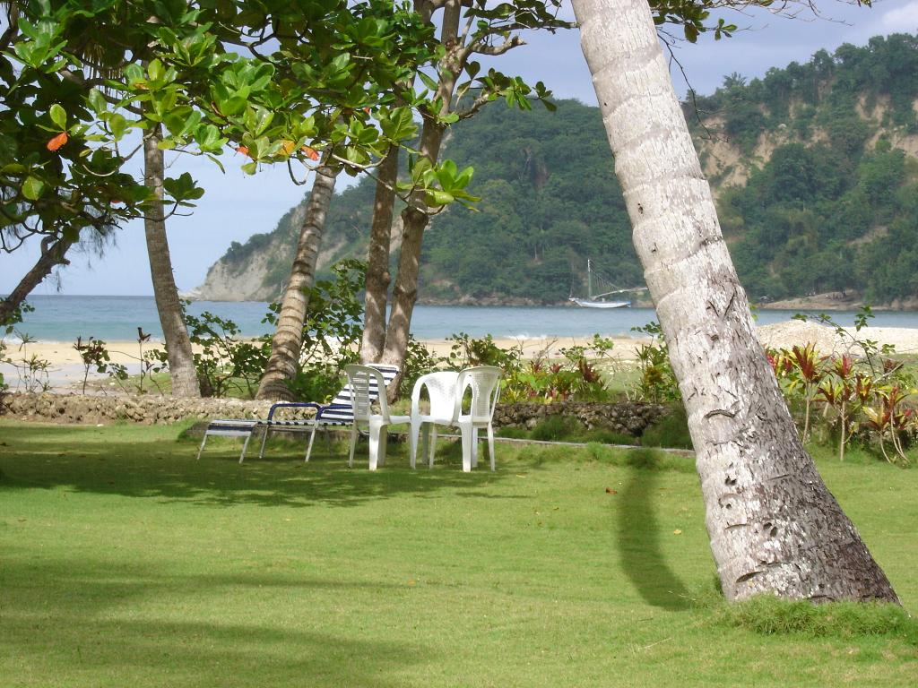 Anse du Clerc, Haiti